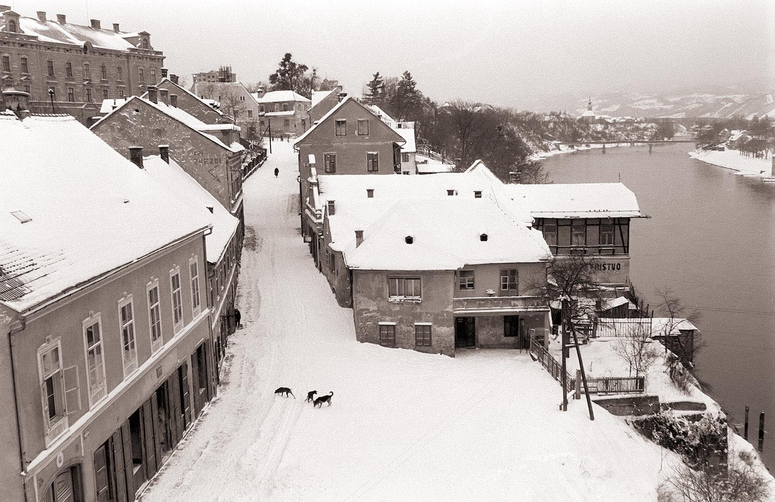 Zimski motiv ob Dravi - Taborska ulica.